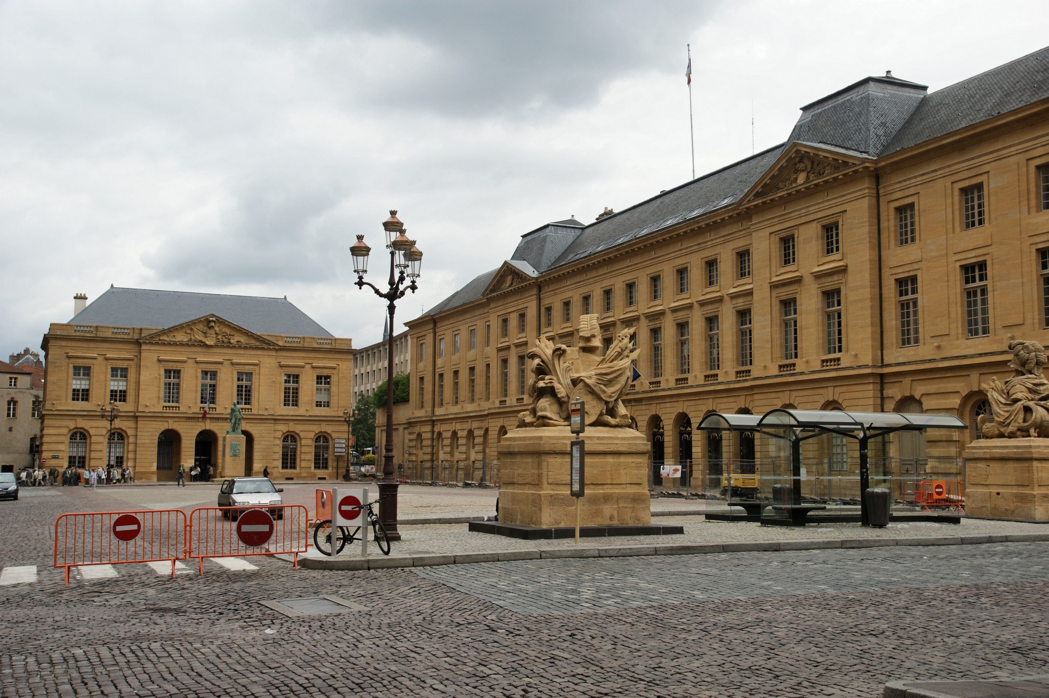 Une vue partielle de la place d'armes à METZ. Cette place, entièrement pavée, est entourée de magnifiques bâtiments tous bâtis en pierre de Jaumont. Elle a été creé dans les années 1750 - 1770 . On peut voir , sur la droite , la mairie de METZ.